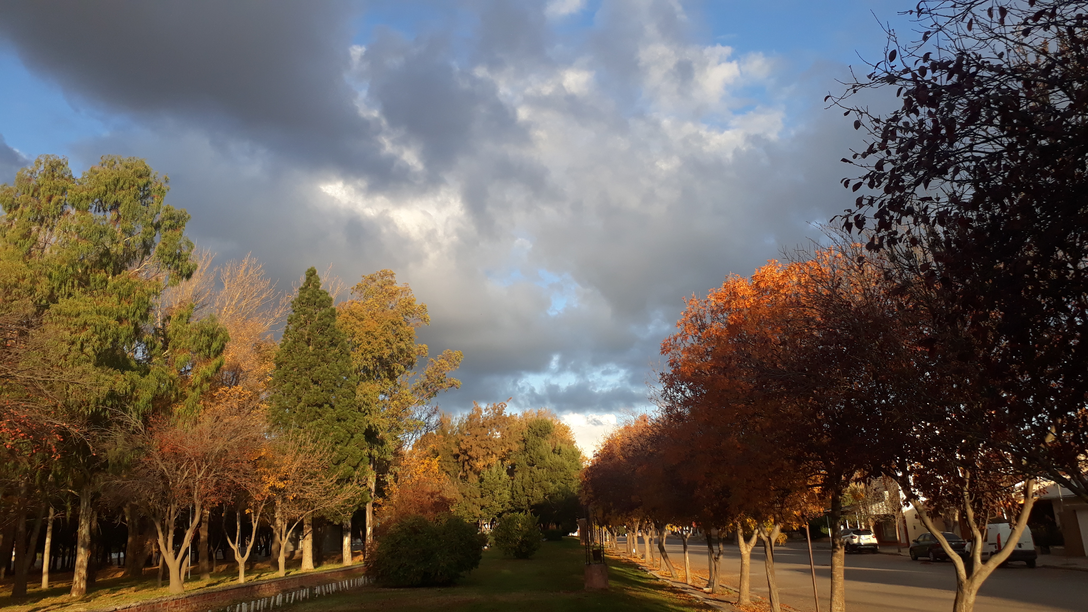 Hermosa tarde otoñal en la plaza de Choele